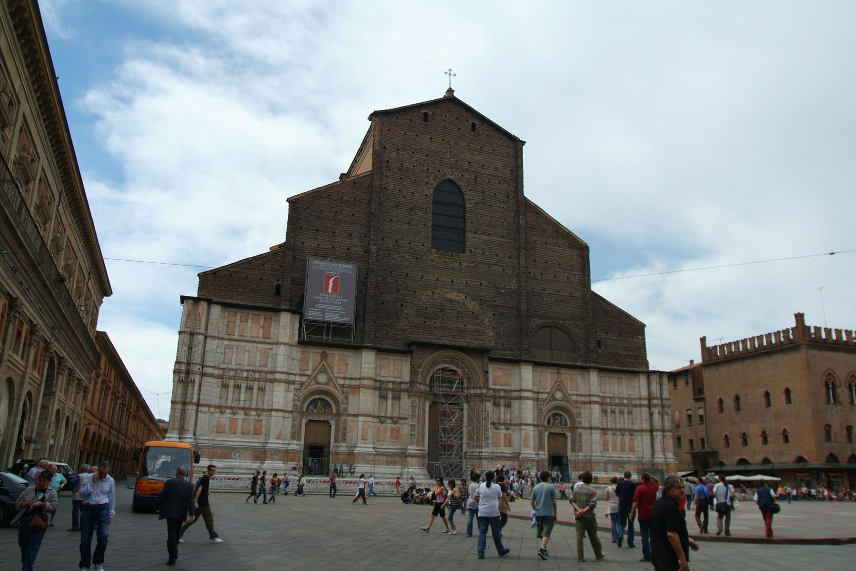 Facciata di San Petronio a Bologna.